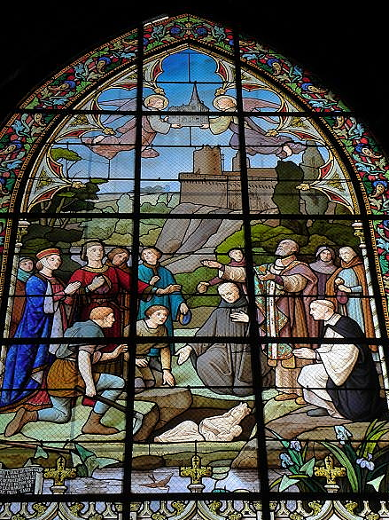 Invention de la statue de Notre-Dame-des-Marais aux XIIIe-XIVe siècles. Partie haute du vitrail de la légende de Notre-Dame-des-Marais de l'église Saint-Sulpice de Fougères (35).